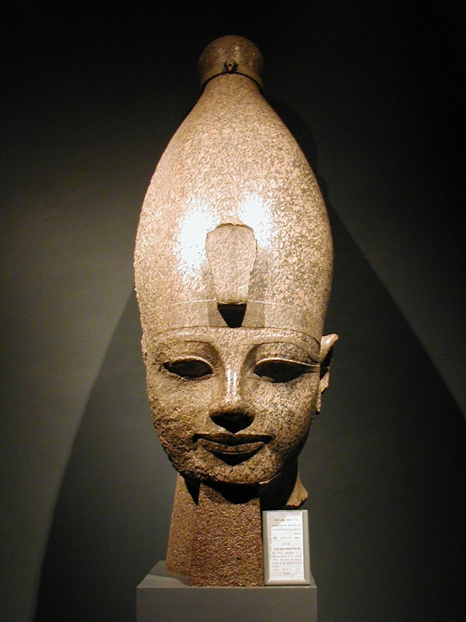 Antiquité égyptienne, Musée de Louxor, (Égypte). Amenhotep III (Templo de Amenhotep en Qurna)